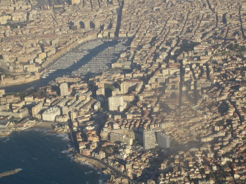 Vieux Port vu d'avion, Marseille, France.